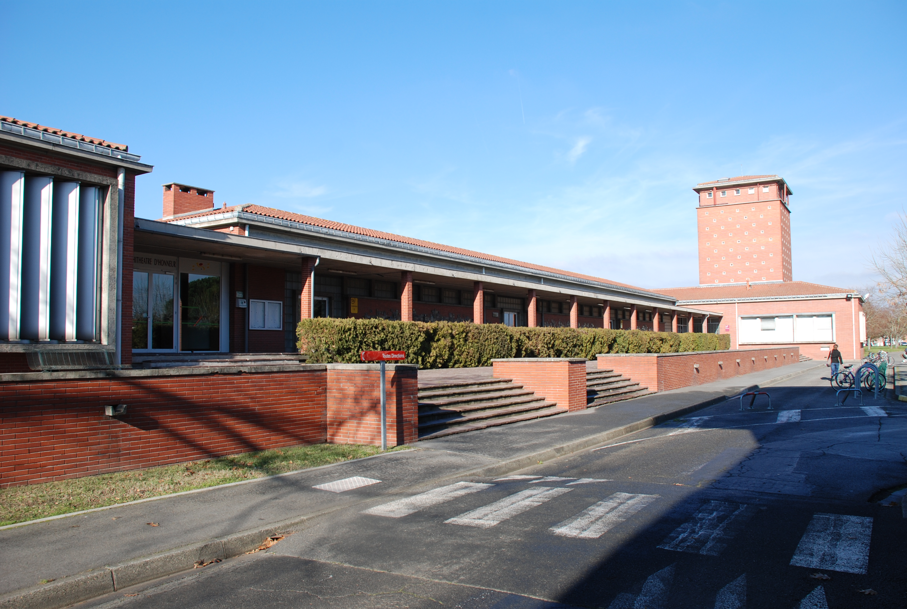 École nationale vétérinaire de Toulouse : Cour d'honneur, amphithéâtres, bibliothèque